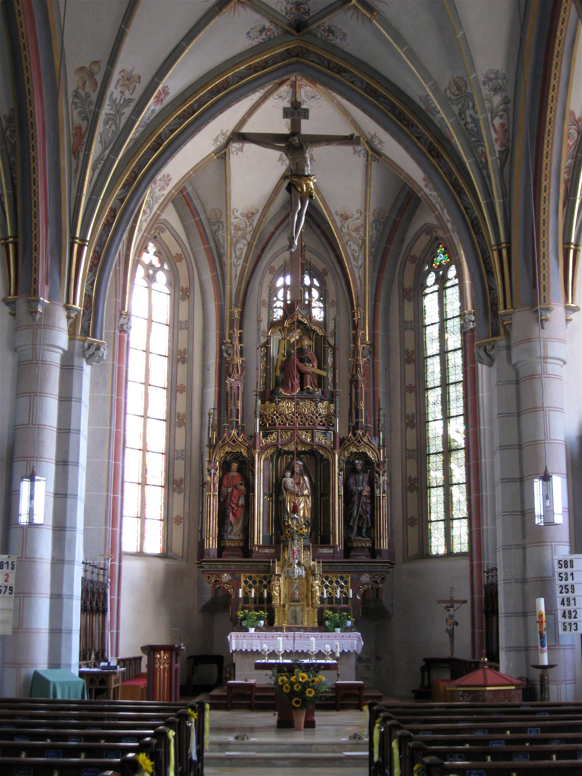 Kienberger Straße 4; Katholische Pfarrkirche St. Laurentius, spätgotische, dreischiffige Hallenkirche, geweiht 1491, Erweiterung des Langhauses 186871; mit Ausstattung.